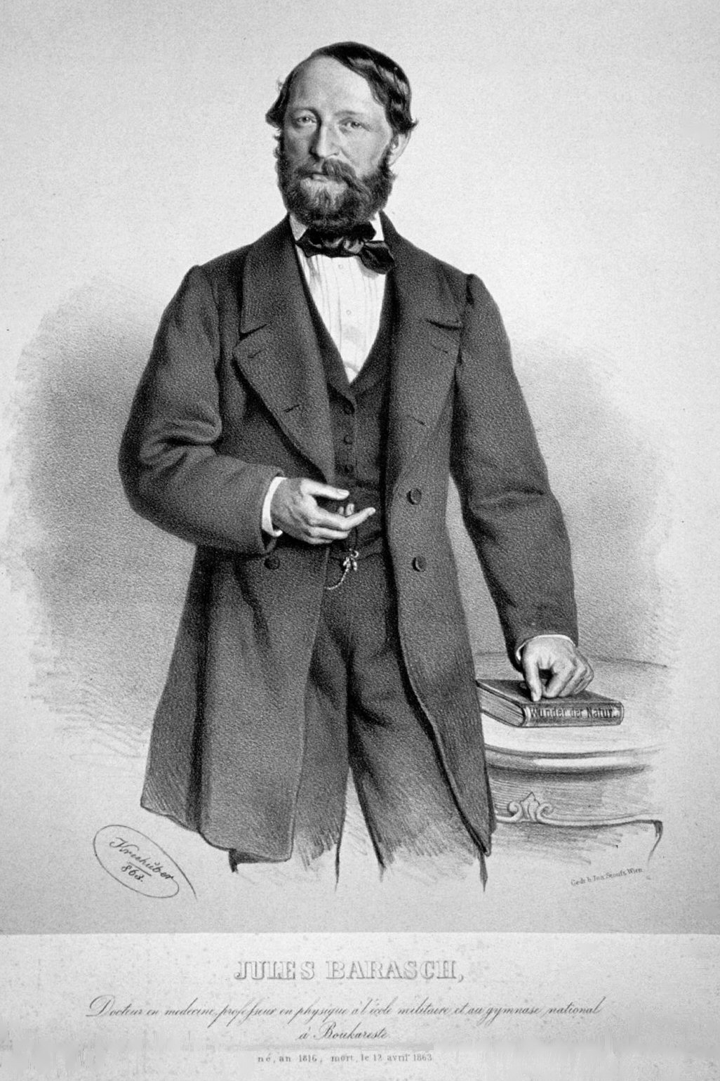 Julius Barasch (1816.1863), Arzt, Schriftsteller, Journalist, rumänischer Patriot. Lithographie von Josef Kriehuber, 1863